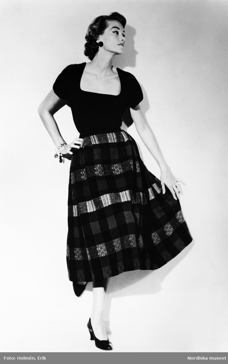 Modell i Ripsakjol, svart top och svarta pumps. Ripsakjolen tillverkad av Erling Rickard med ensamrätt för Sverige. Lanseras av Dior i Paris. 87 SEK.